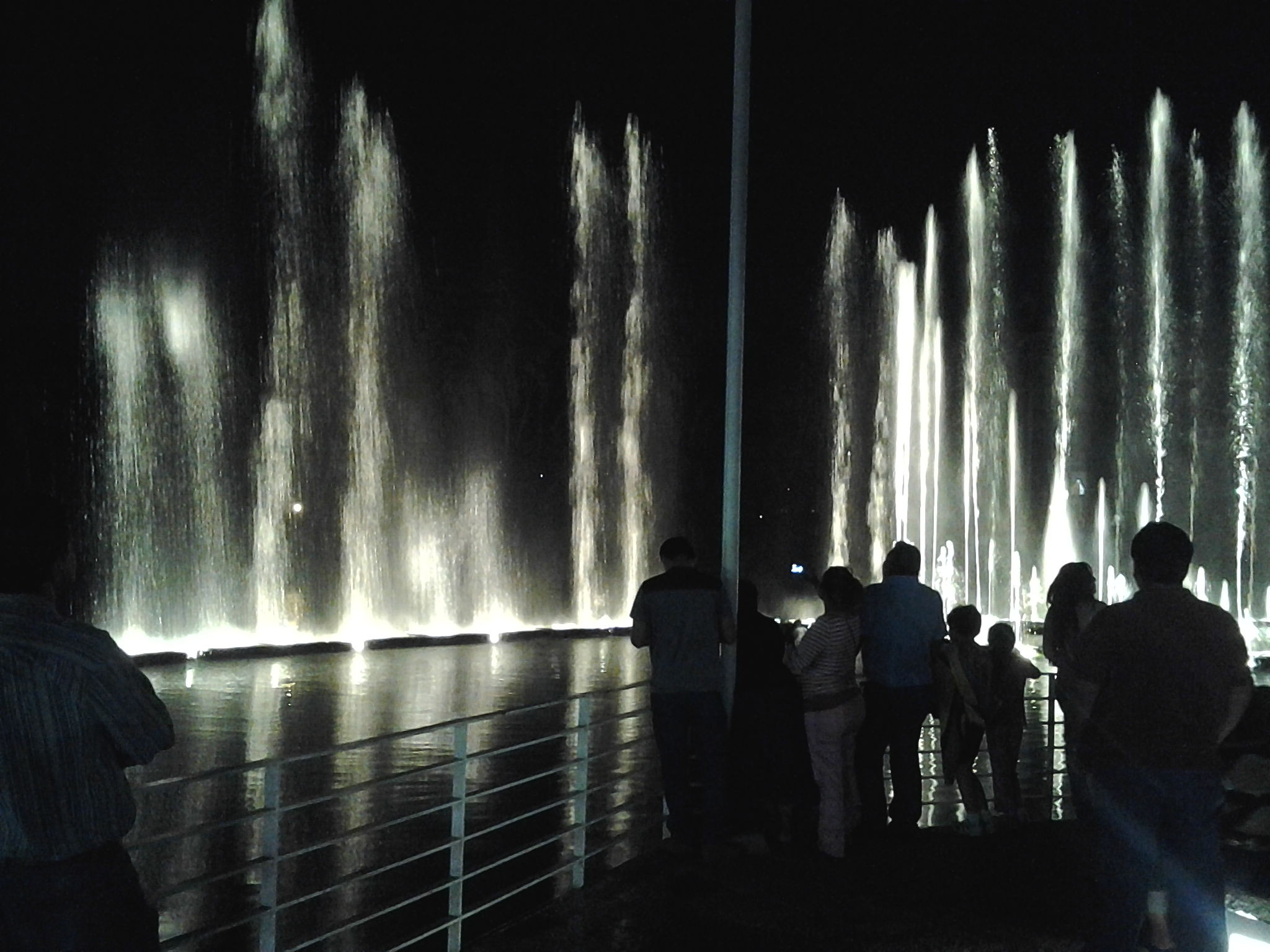 Momento durante la exhibición.